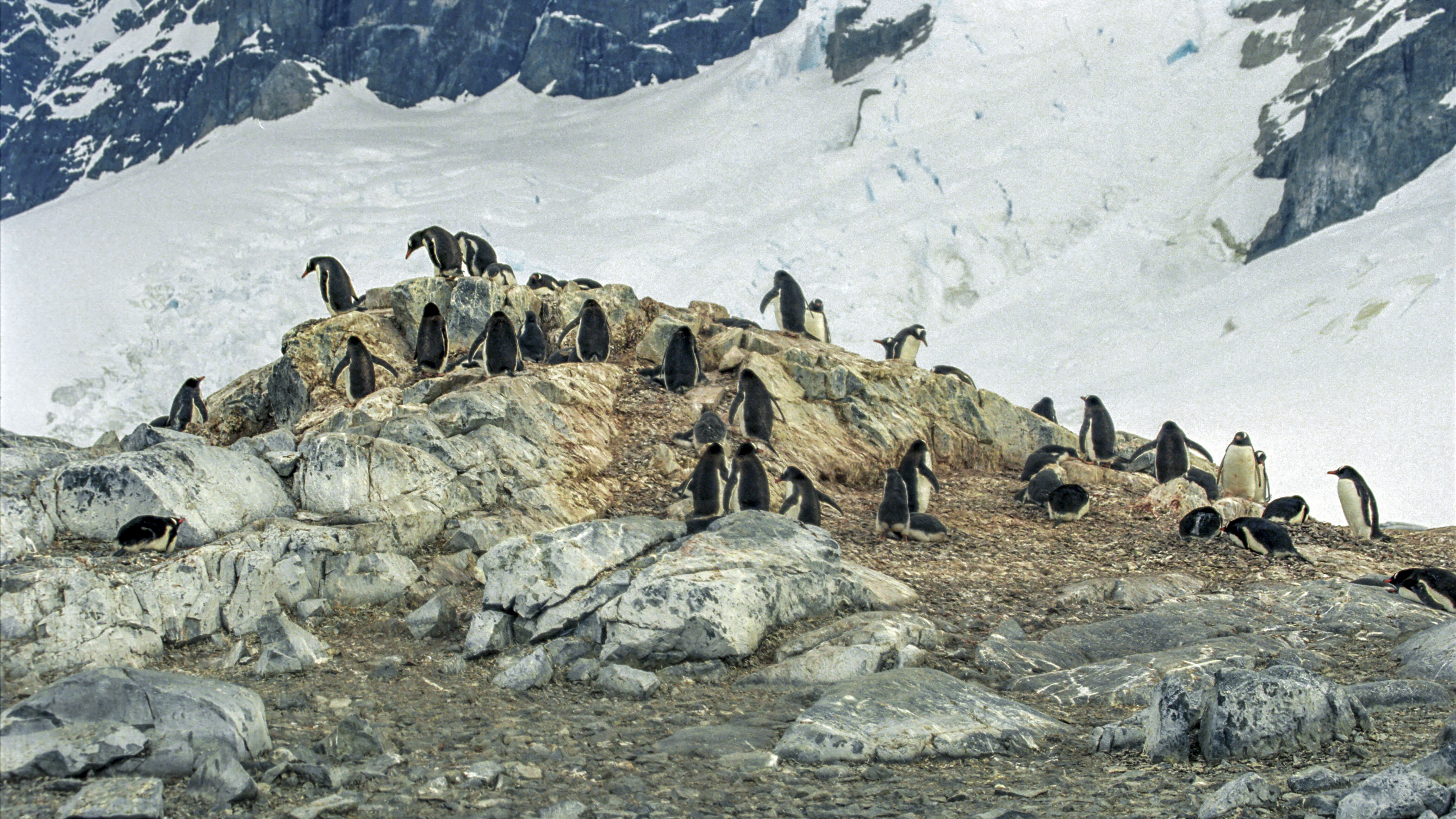 Pygoscelis papua Pingwin białobrewy